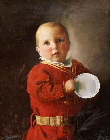 Childrens portrait